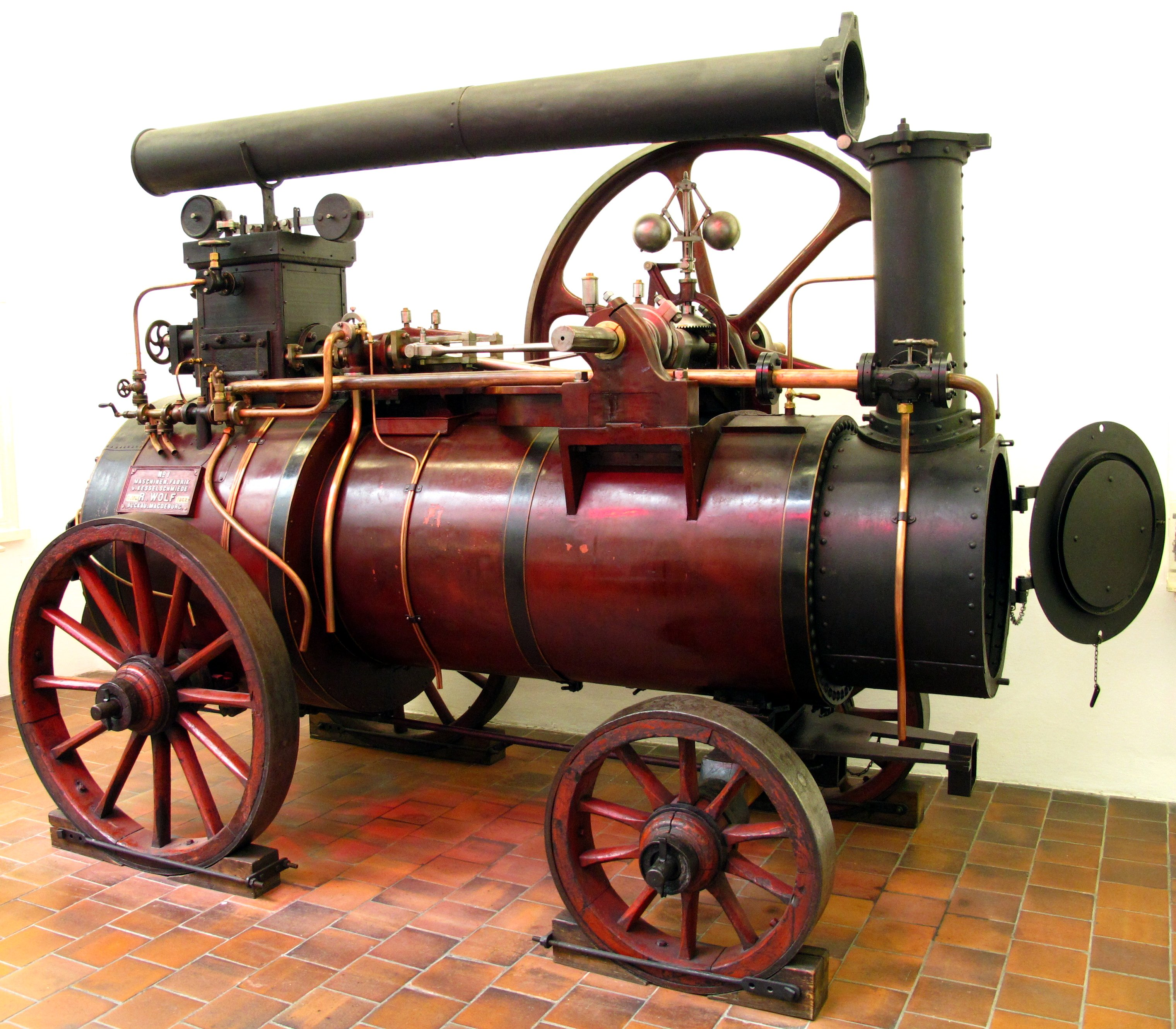 Fahrbare Dampflokomobile diente zwischen 1862 und 1887 zum Antrieb von Dreschmaschinen in der Landwirtschaft. Pferde zogen sie zum jeweiligen Einsatzort. Die einzylindrige Kolbendampfmaschine ist über dem mit Holz beheiztem Dampfkessel angeordnet. Hersteller: Maschinenfabrik Rudolf Wolf, Magdeburg-Buckau, 1862 Dampfdruck: 6 bar Drehzahl: 120 RPM Leistung 5,8 kW